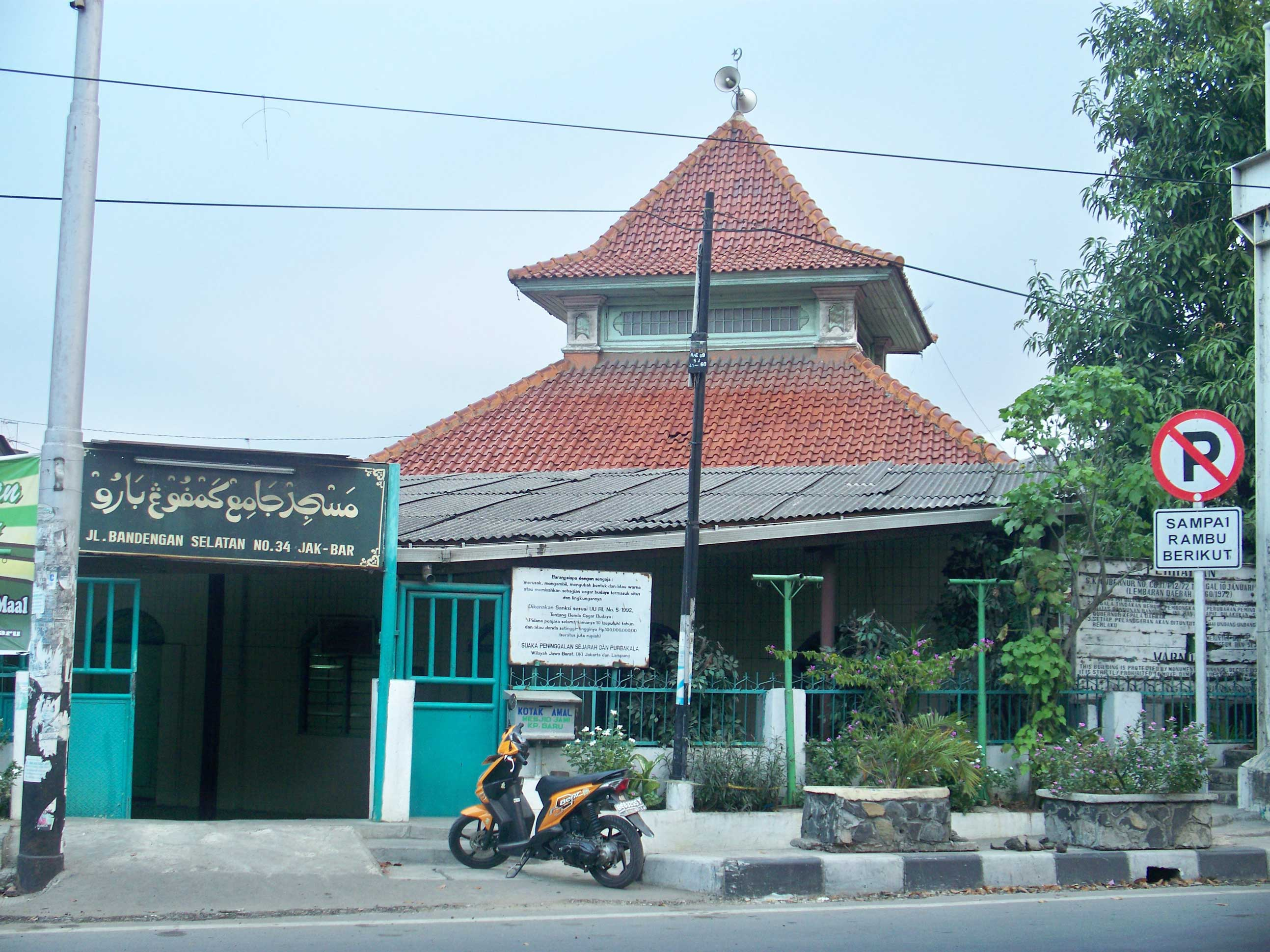 Masjid Bandengan Atau Masjid Kampung Baru